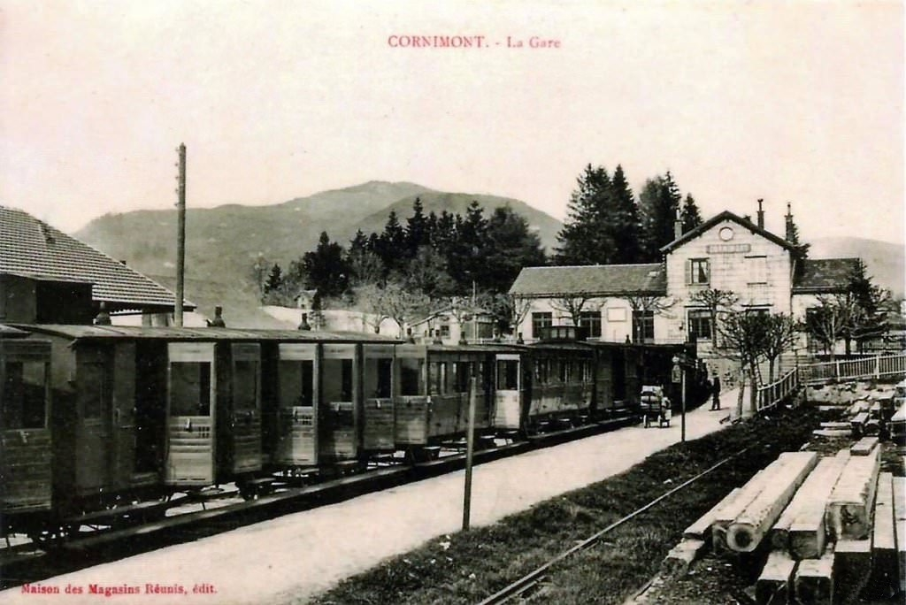 Carte postale de la gare vers 1920.